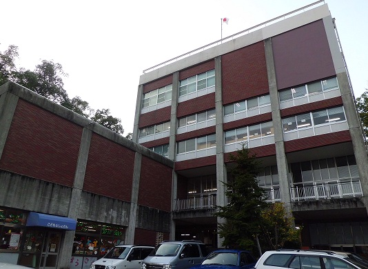 長崎県立長崎図書館